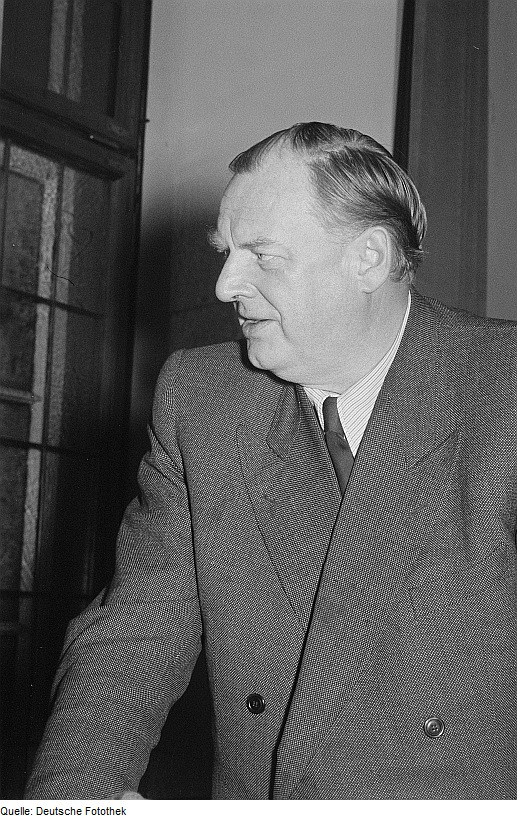 Original image description from the Deutsche Fotothek Portrait des Schauspielers Johannes Arpe